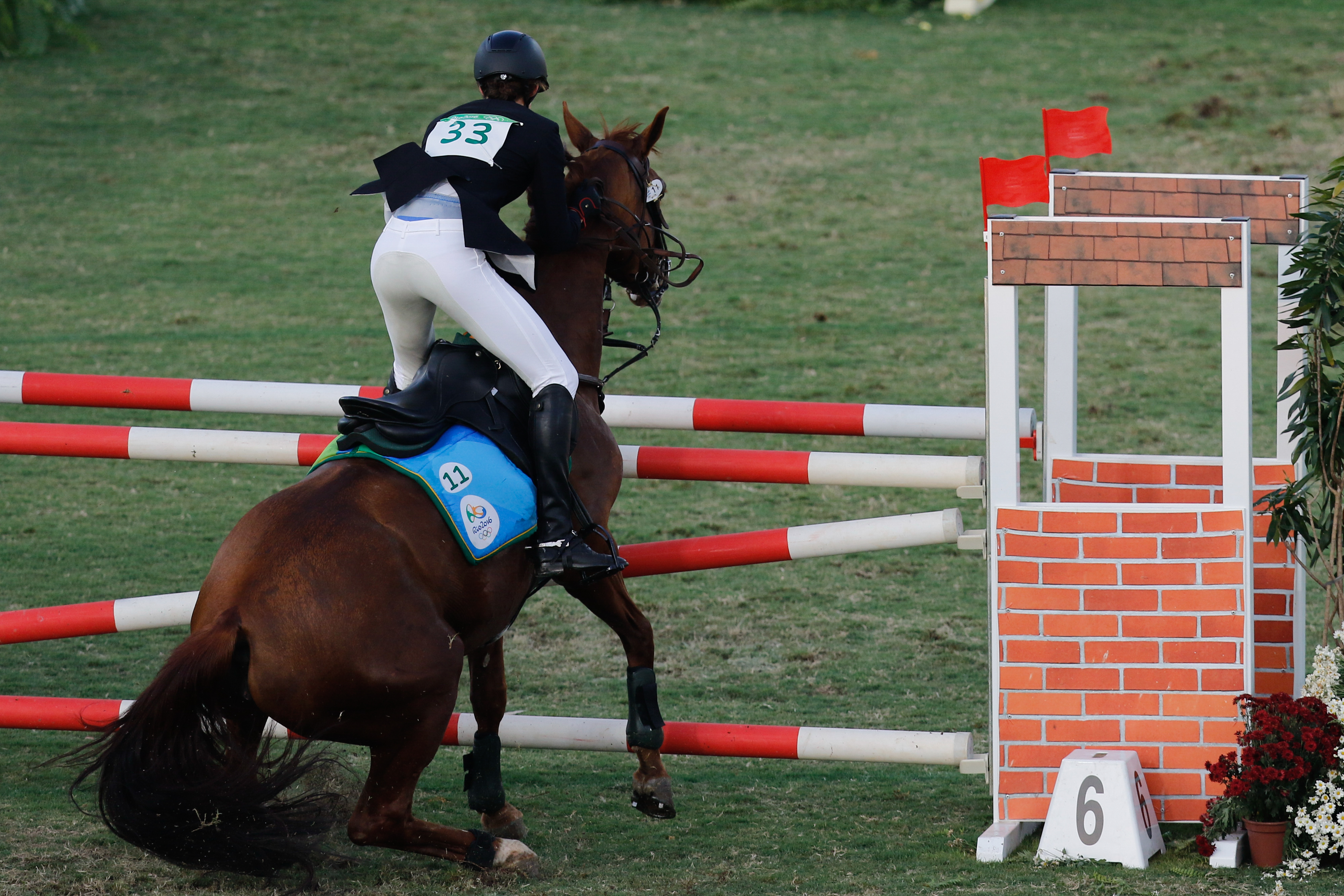 Rio de Janeiro - Cavalo Legende refuga com a atleta alemã Lena Schoneborn na final do pentatlo moderno dos Jogos Olímpicos Rio 2016 no Estádio de Deodoro (Fernando Frazão/Agência Brasil)